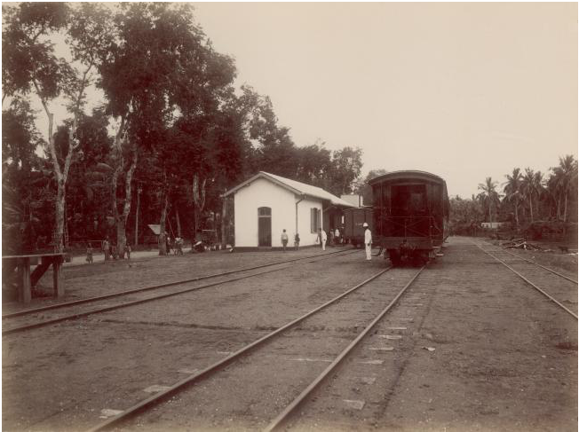 Station Kendal van de Semarang-Cheribon Stoomtram Maatschappij (SCS)